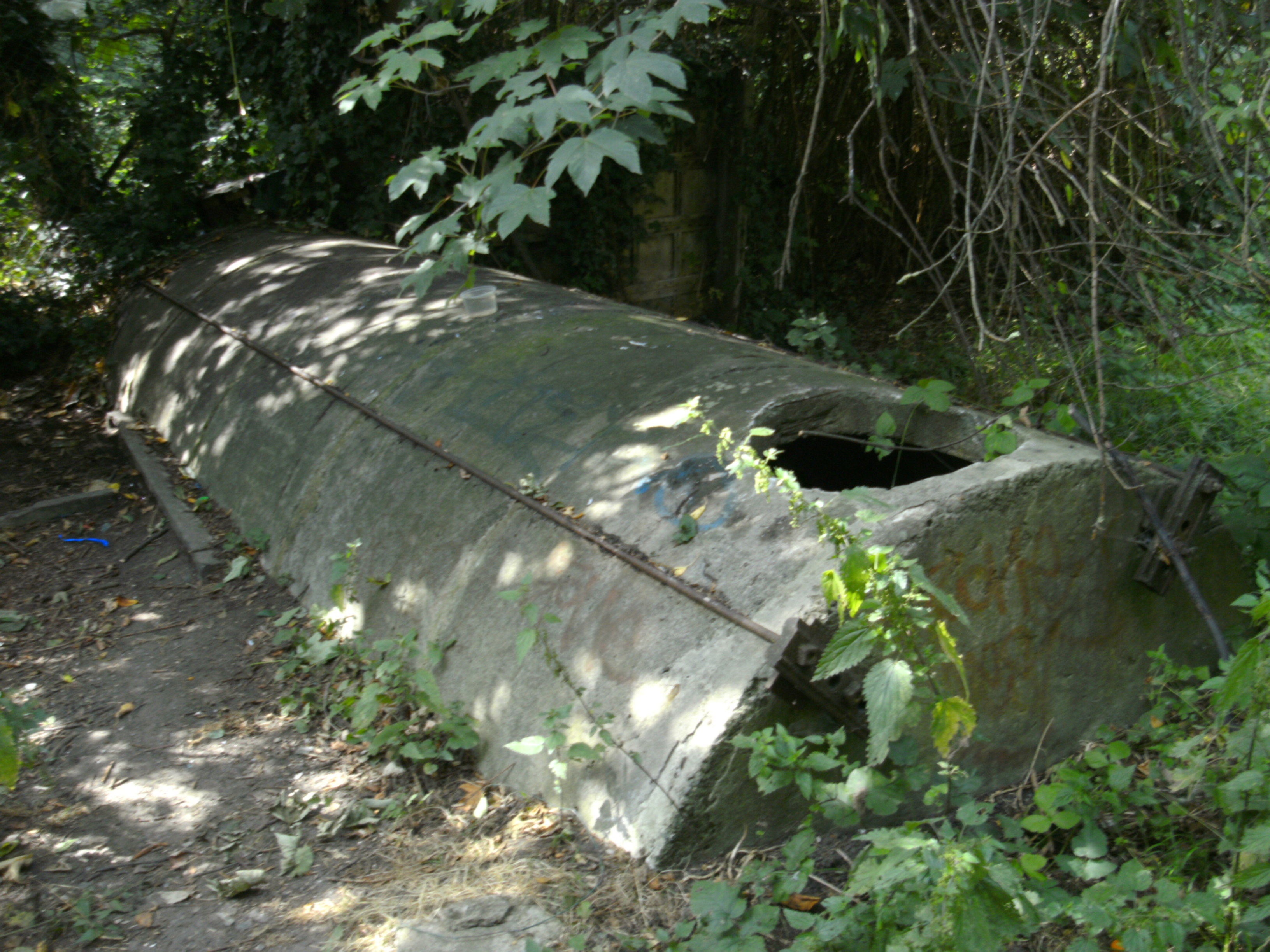 Abris anti-aérien de la Seconde Guerre mondiale dans le Moeraske à Evere. Utilisé par les sentinelles allemandes de la gare de formation de Schaerbeek